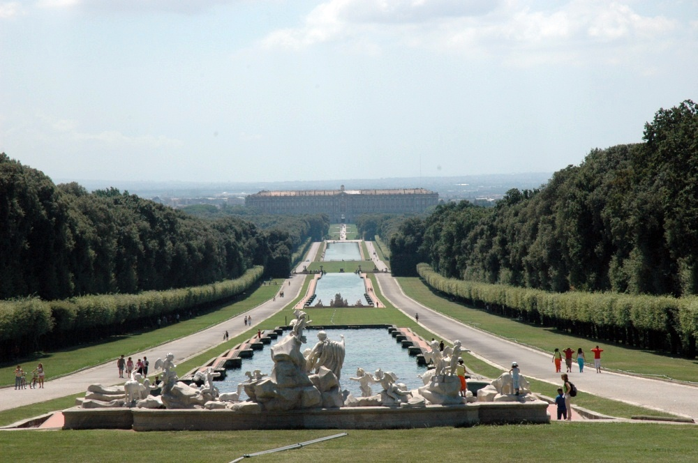 Beschreibung: Der bourbonische Königspalast in Caserta Quelle: Selbst fotografiert Fotograf oder Zeichner: Manuel Mauer Datum: 15.08.05 22:28, 11. Sep 2005 Stanley-goodspeed 1000 x 664 (255271 Byte) (* Beschreibung: Der bourbonische Königspalast in Caserta * Quelle: Selbst fotografiert * Fotograf oder Zeichner: Manuel Mauer * Datum: 15.08.05 * Andere Versionen:)